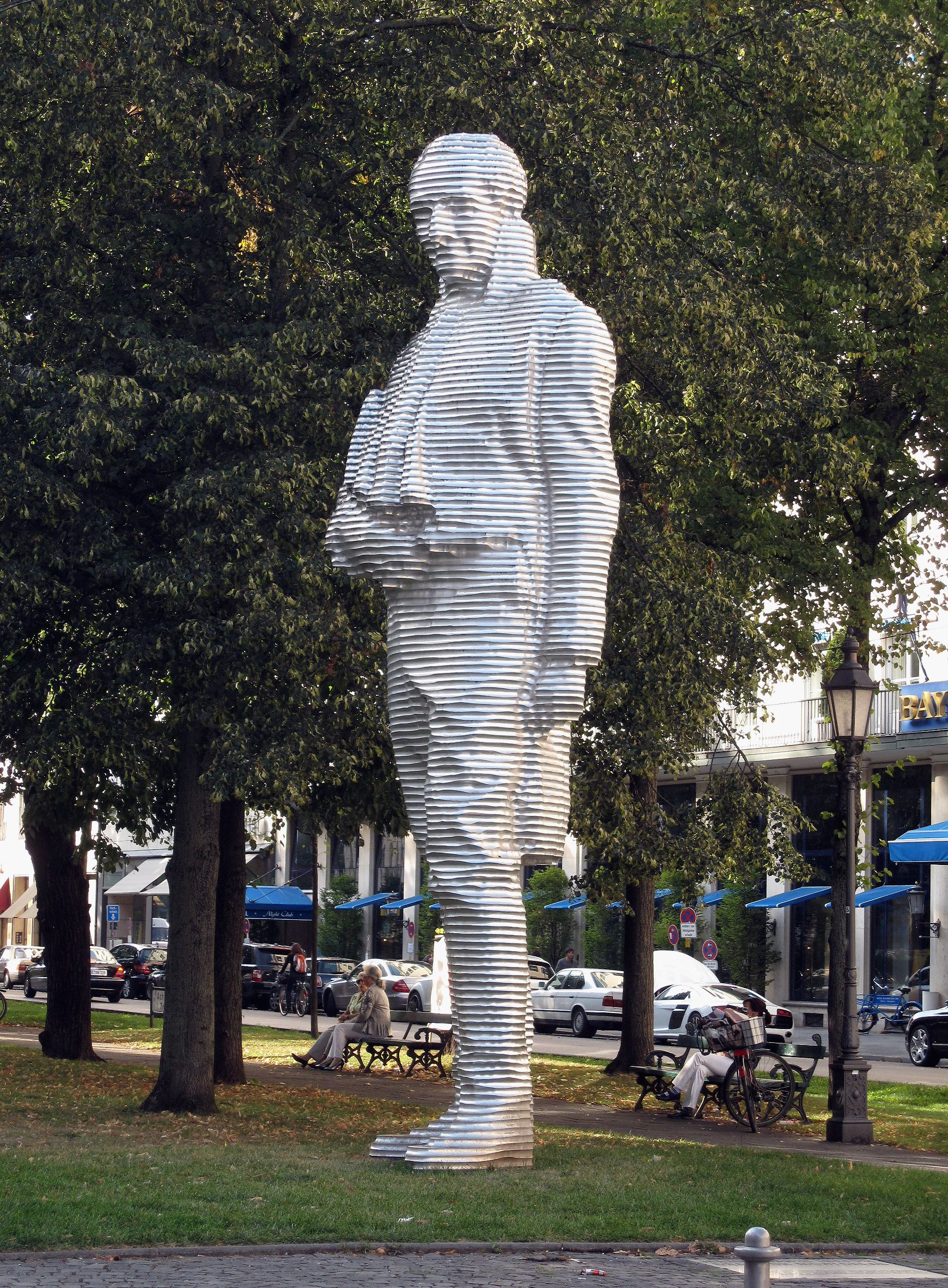 Skulptur Maximilian Joseph Graf von Montgelas aus Aluminium (gefräst) aus dem Jahr 2005 der Künstlerin Karin Sander in München, Promenadeplatz.